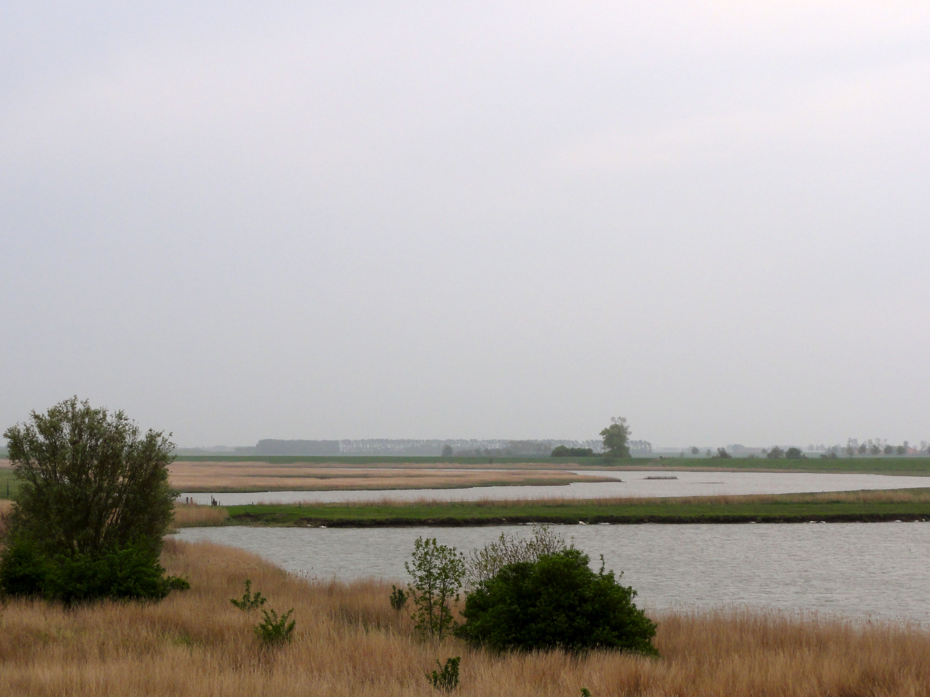 Polder Breebaart in de gemeente Delfzijl in Groningen